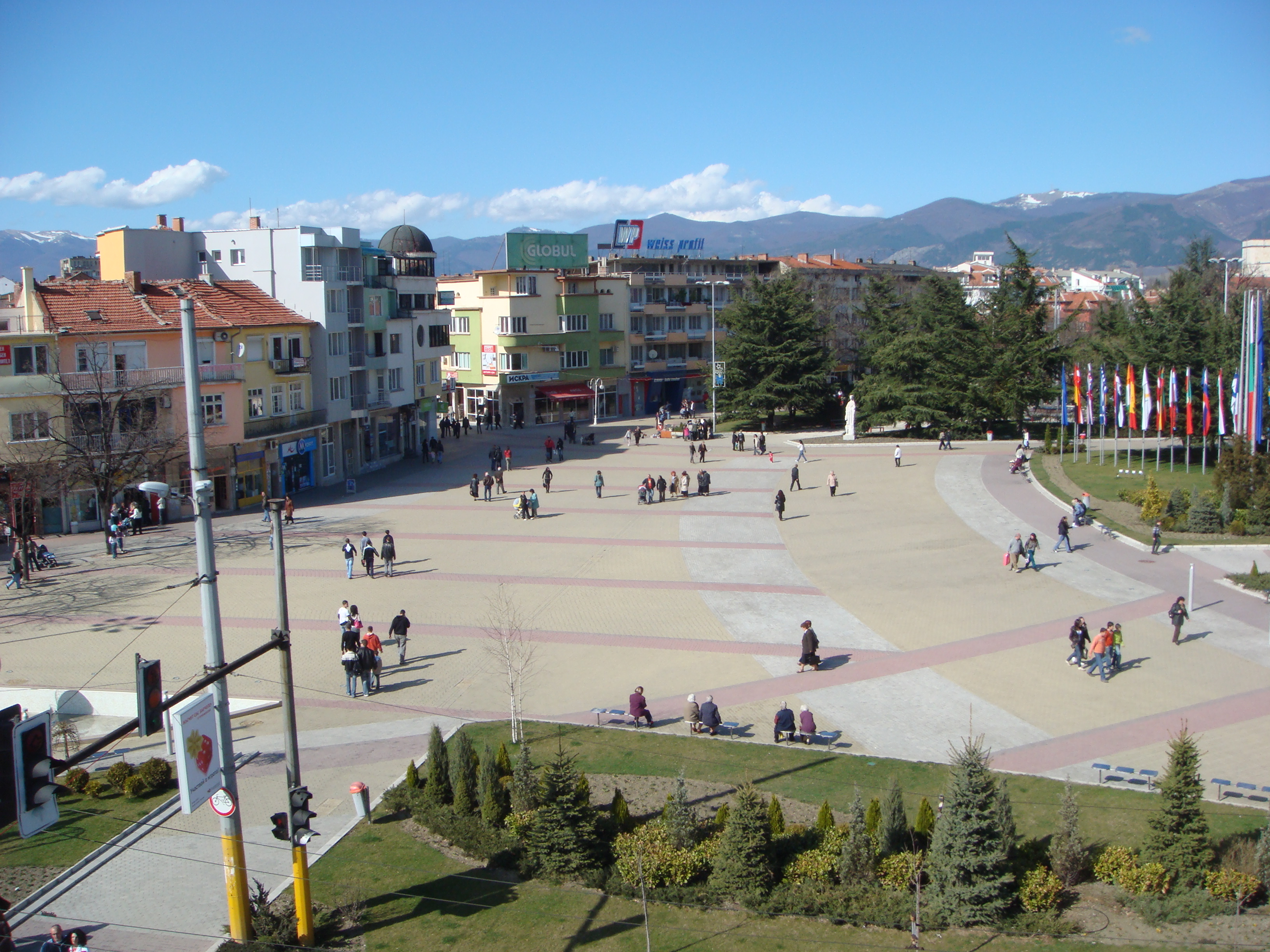 Kazanlak Center